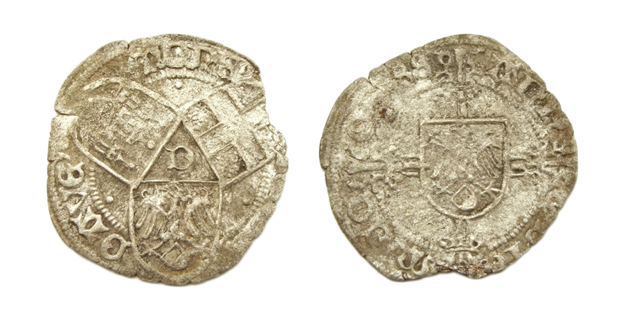 Deventer, ½ Stichtse stuiver 1488 (Driestedenmuntslag) Voorzijde: Wapens van de 3 Rijkssteden Deventer, Kampen en Zwolle. Omschrift: MONE-NOVA-DAVE. Keerzijde: Gebloemd kruis met het wapen van Deventer. Omschrift: ANN-O*DN-M*CC-CC*88.